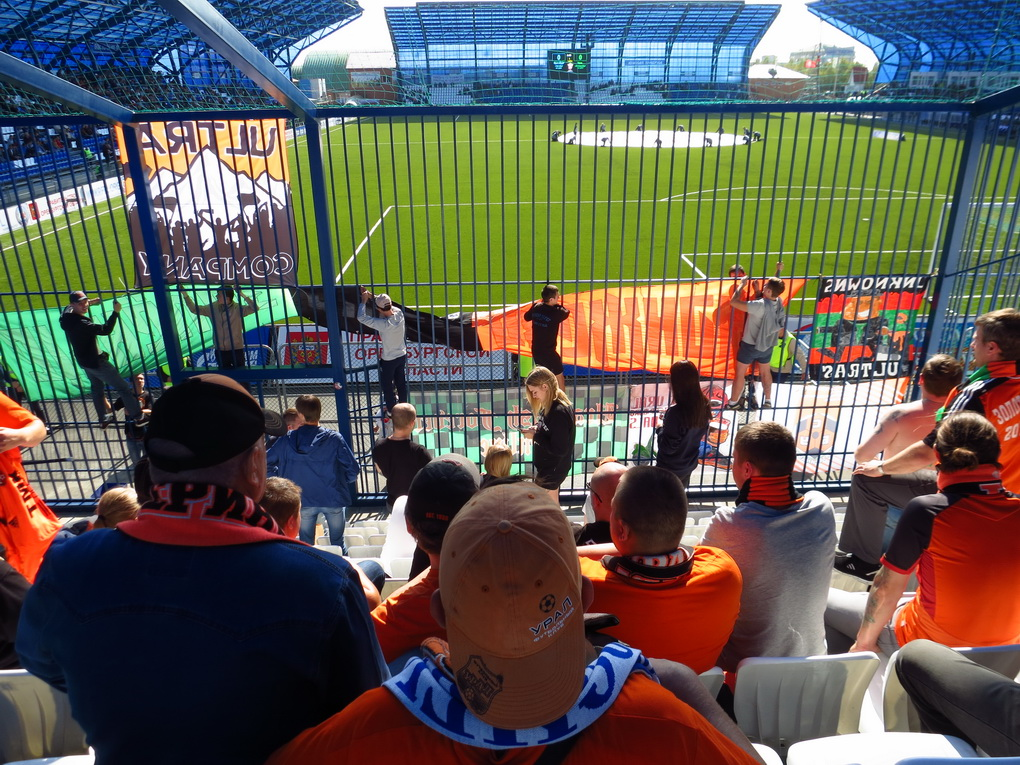 Вид с Северной трибуны (Гостевой сектор D-2) стадиона "Газовик".